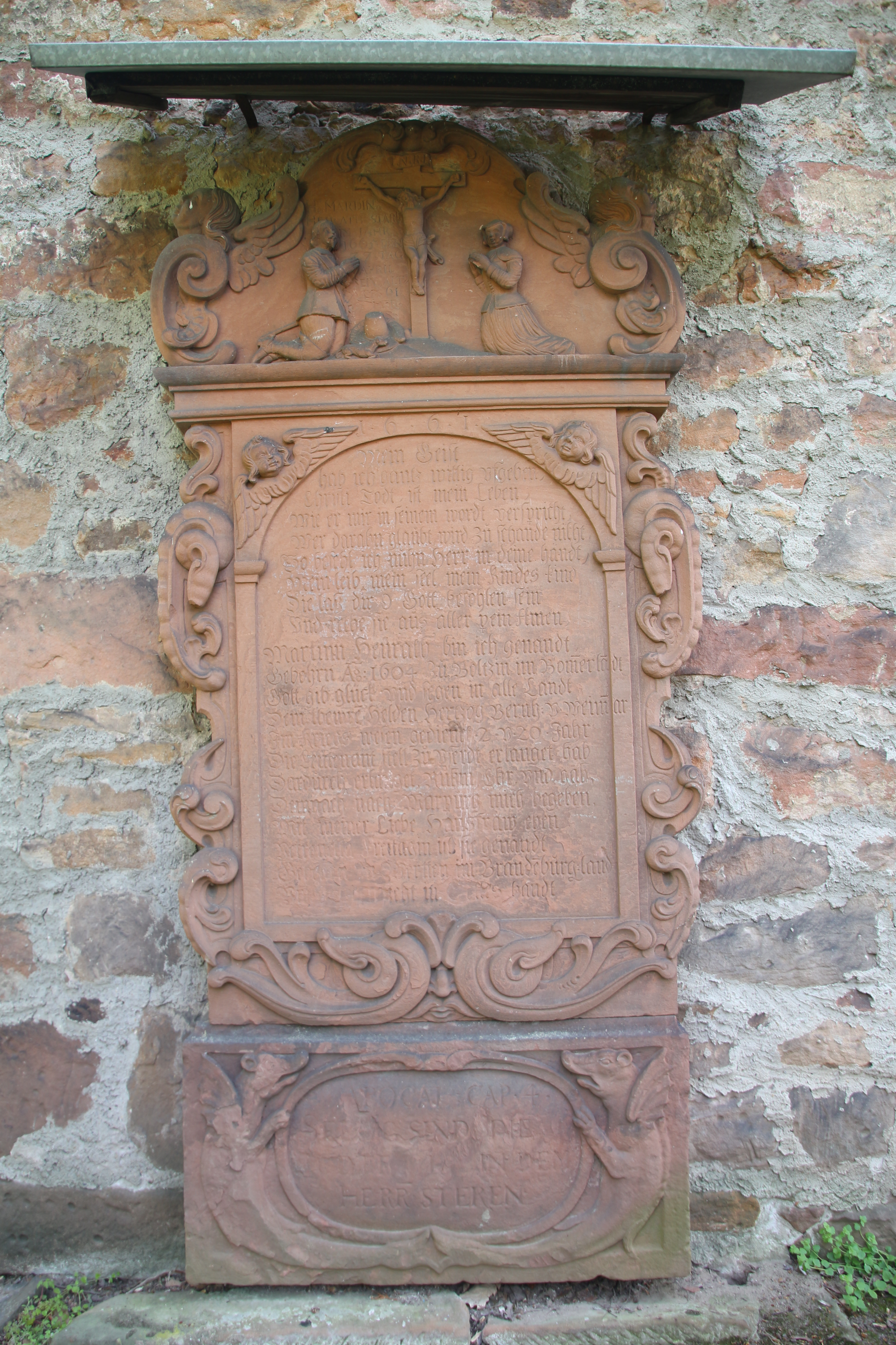 Siehe Bild und Dateiname